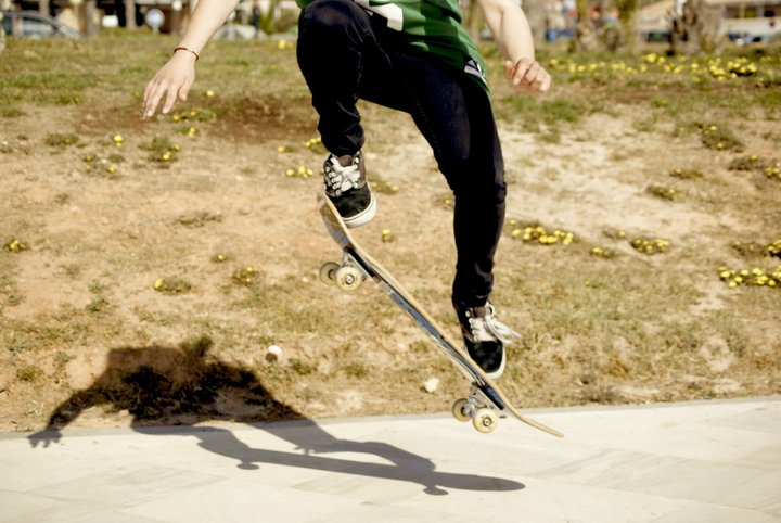 Proceso de Ollie. Torrevieja, España